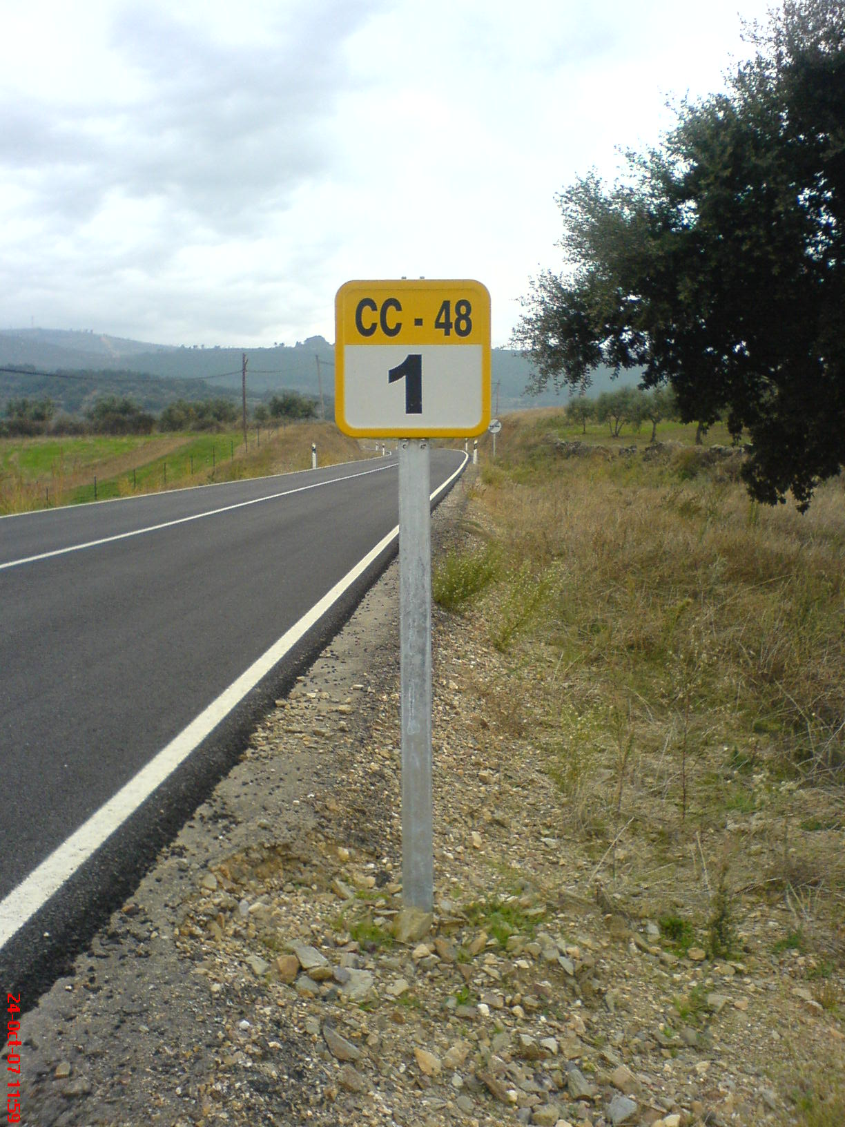 Hito kilométrico de las carreteras de la Diputación Provincial de Cáceres